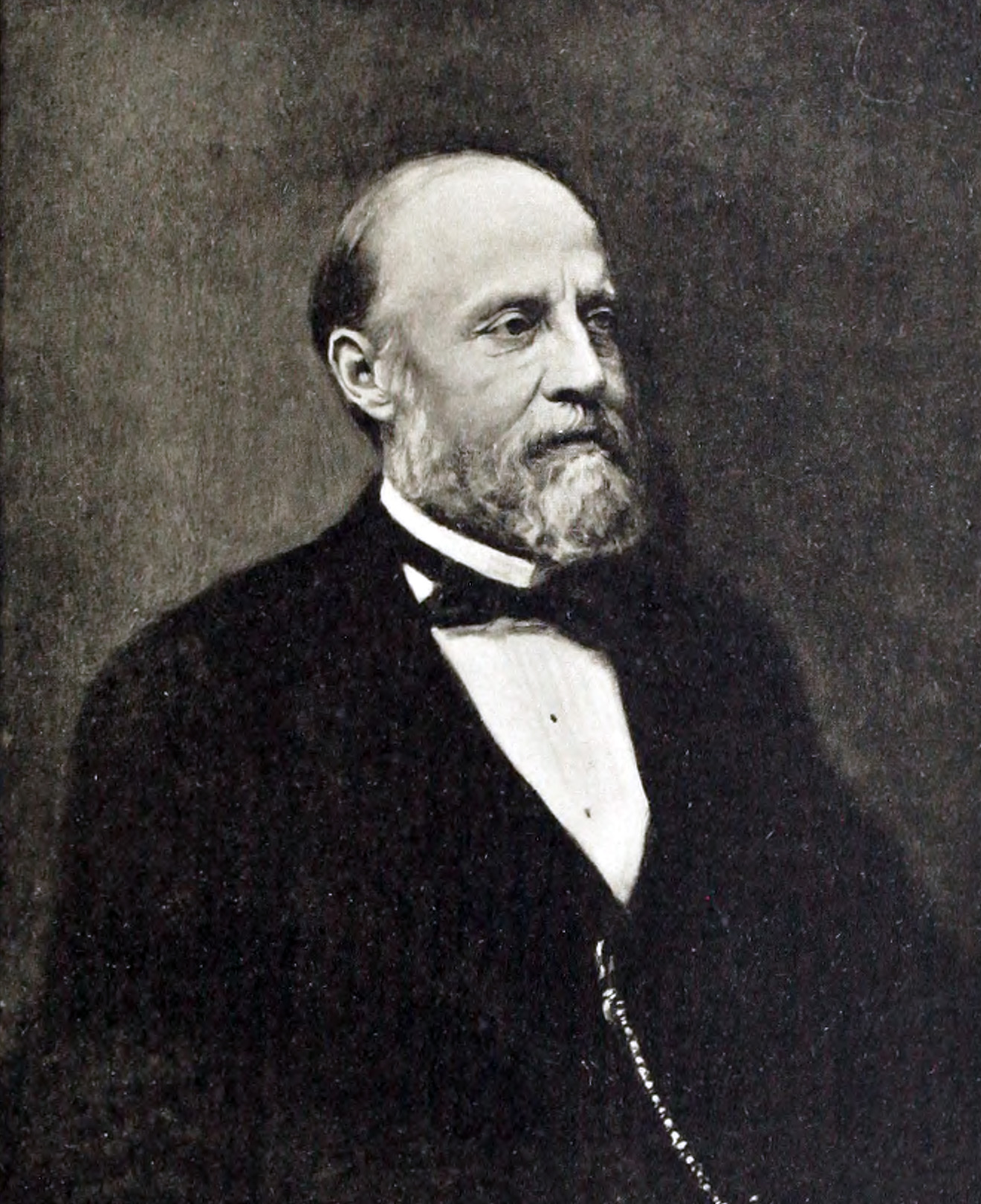 Sten Stenberg (1824-1884)